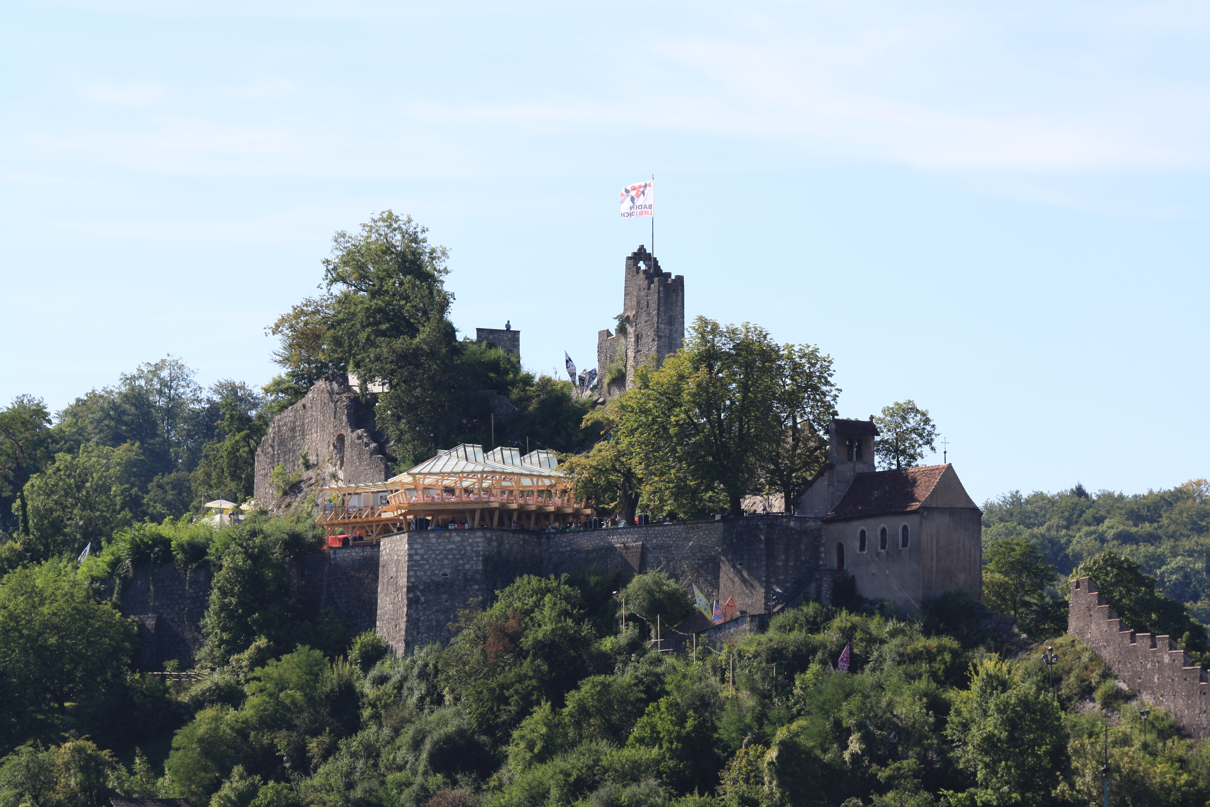 Schloss Stein